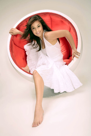 Fotoshooting